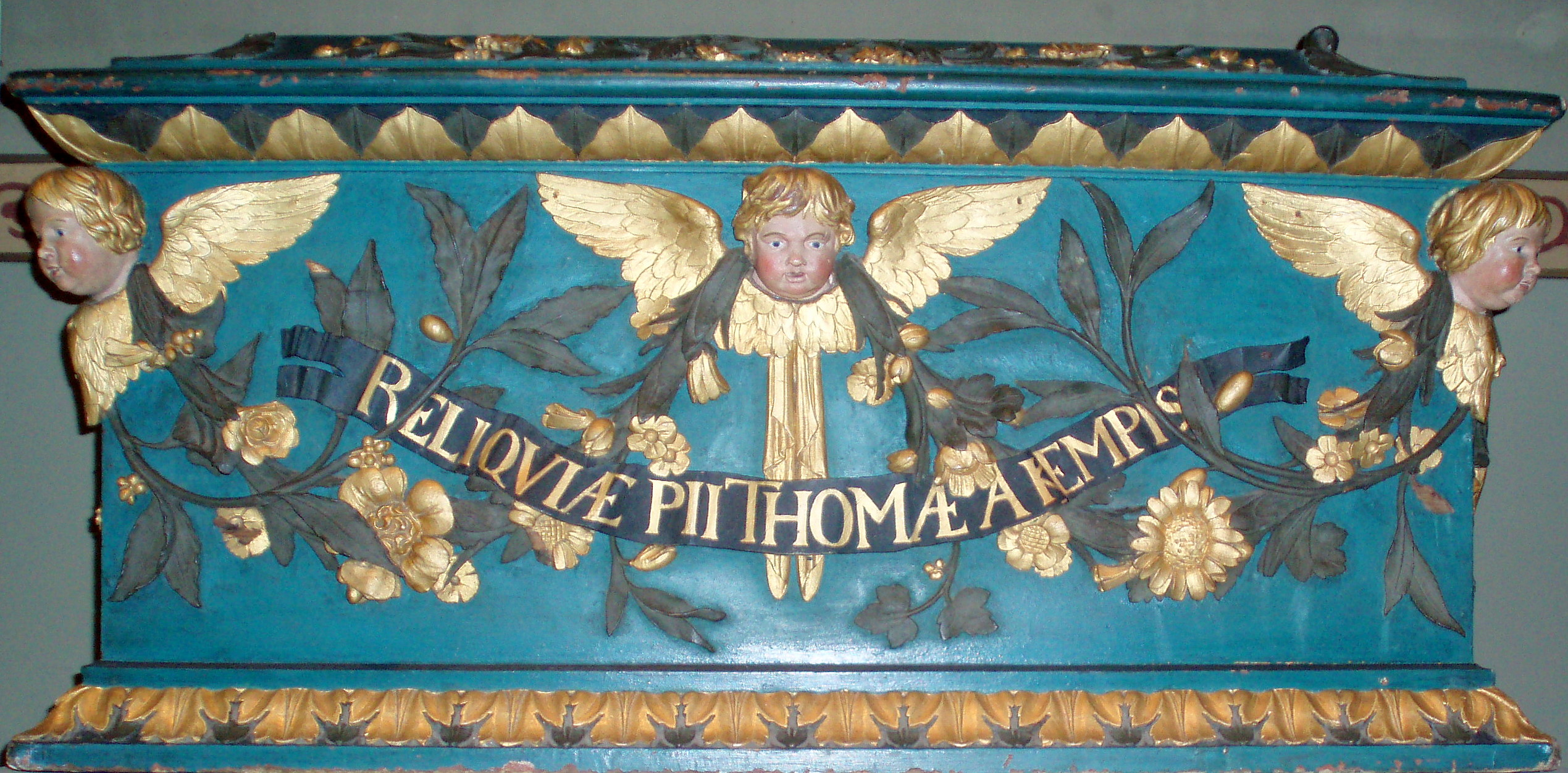 De schrijn van Thomas a Kempis in de Basiliek van Onze Lieve Vrouwe Tenhemelopneming te Zwolle.